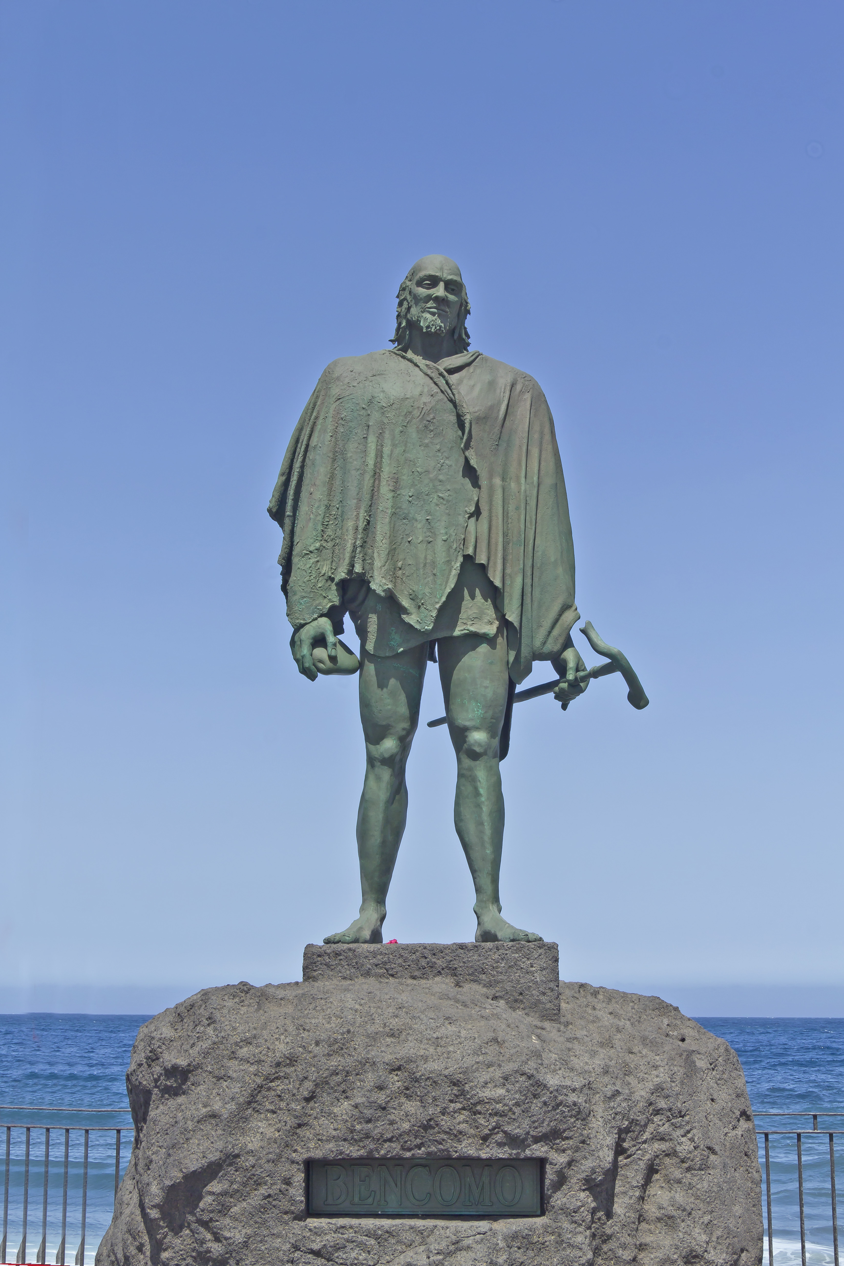 Die Plastik des Mencey Bencomo auf der Plaza de la Patrona de Canarias in Candelaria, Teneriffa, Spanien wurde von José Abad geschaffen.